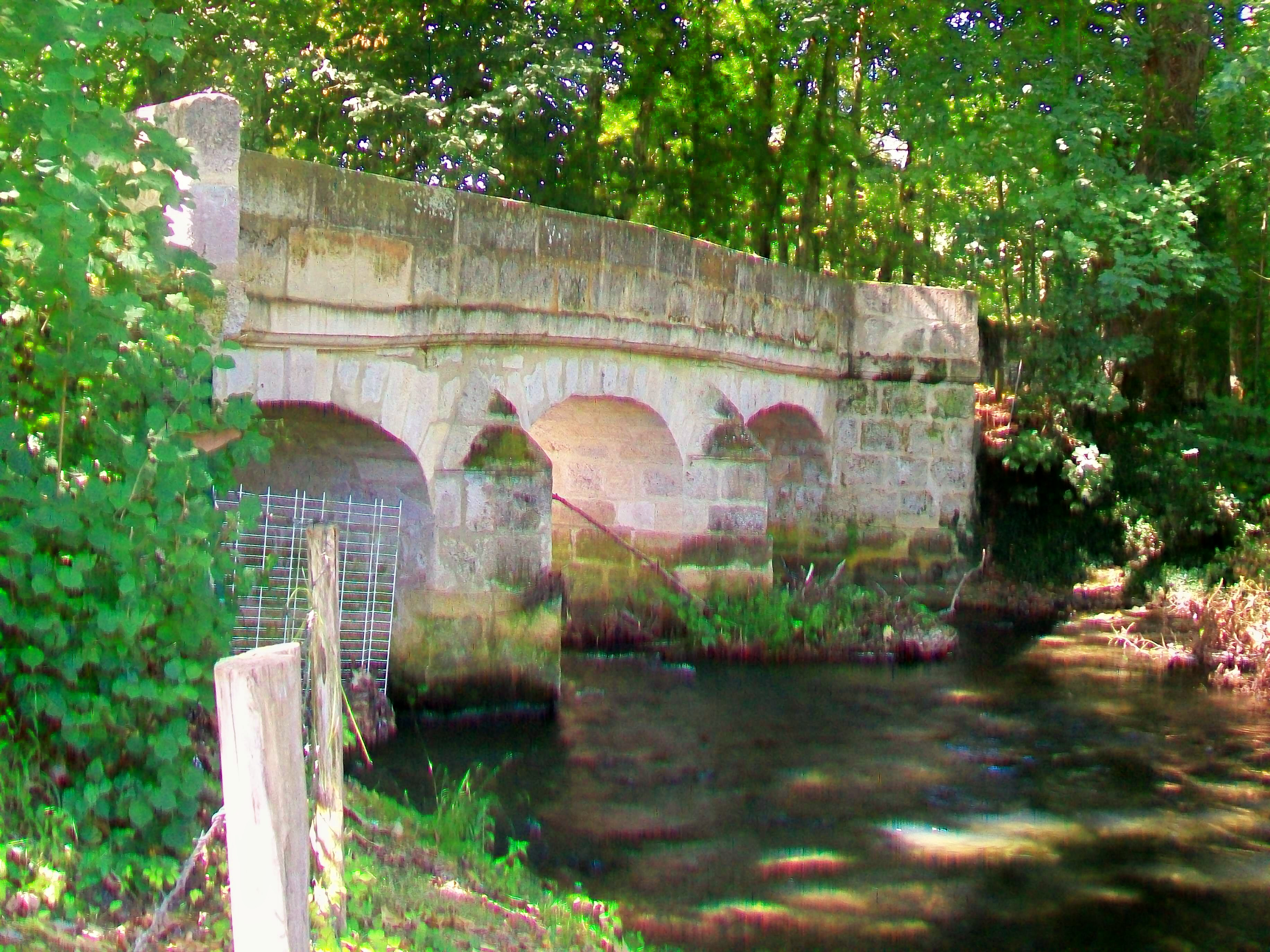 Le pont d'Aveny sur l'Epte, vue depuis le nord (côté Copierre - commune de Montreuil-sur-Epte).